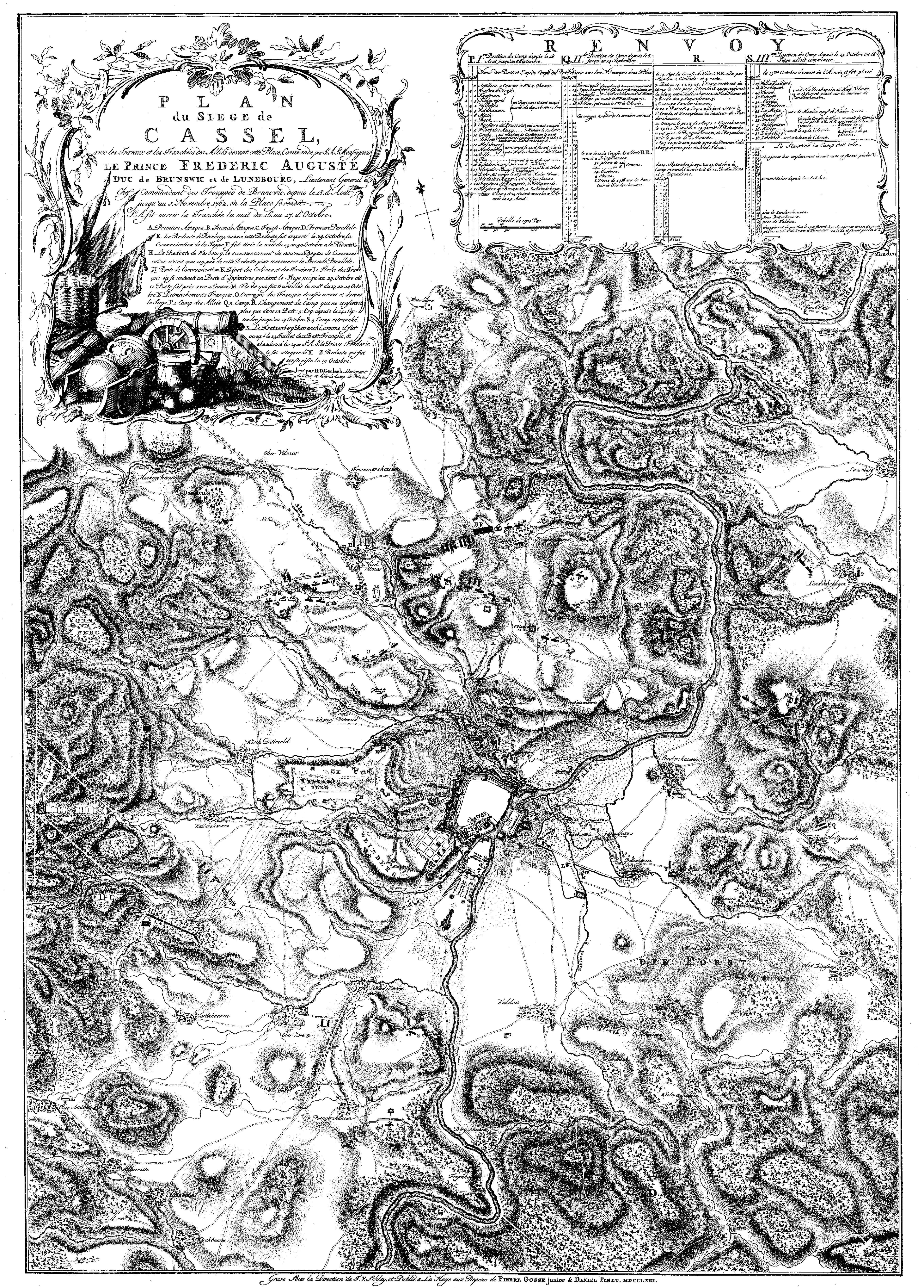 Der Plan zeigt die Stadt Kassel und ihre Umgebung um 1760